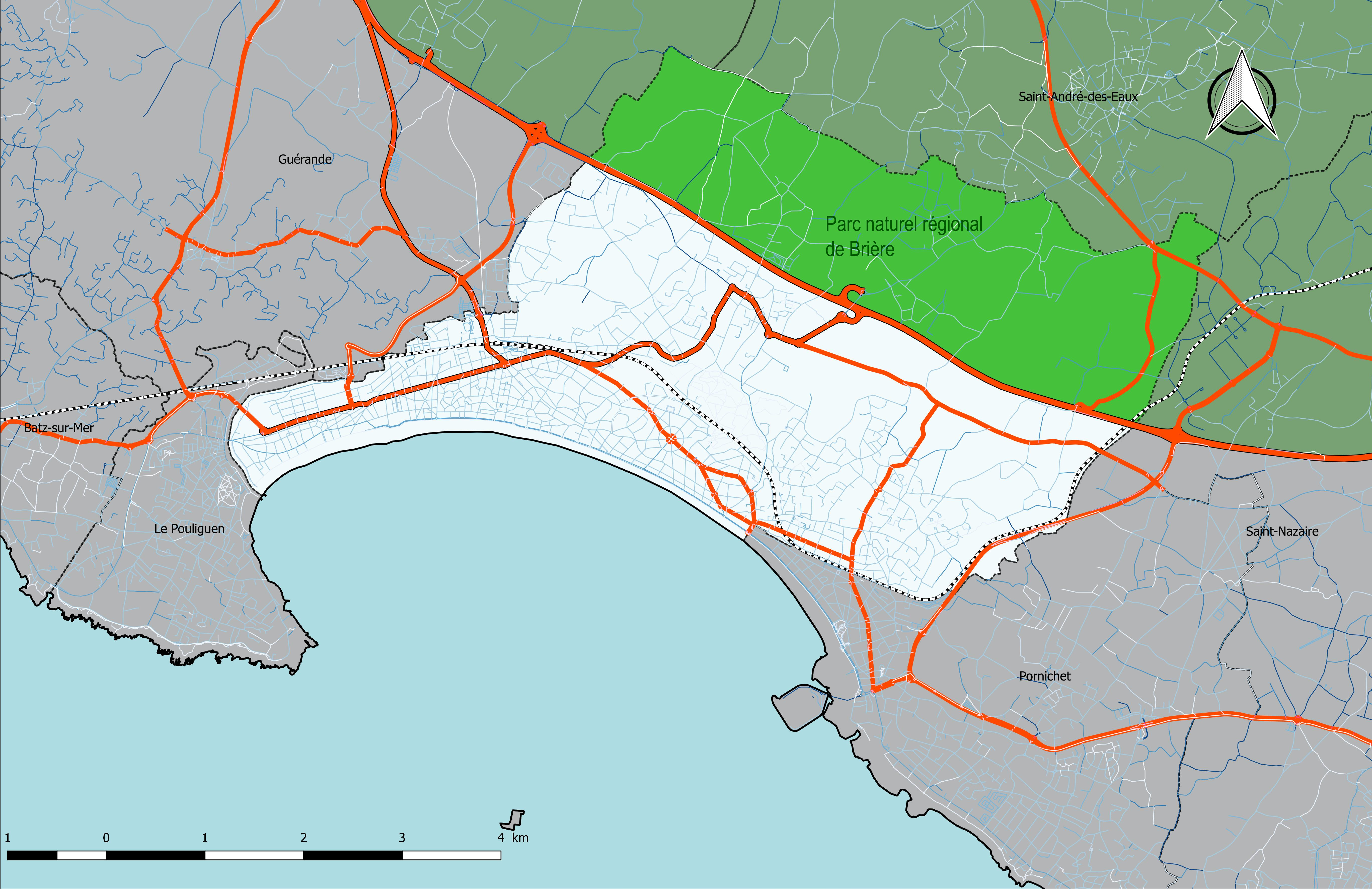 Commune de La Baule-Escoublac - Carte du parc naturel régional de Bièvre